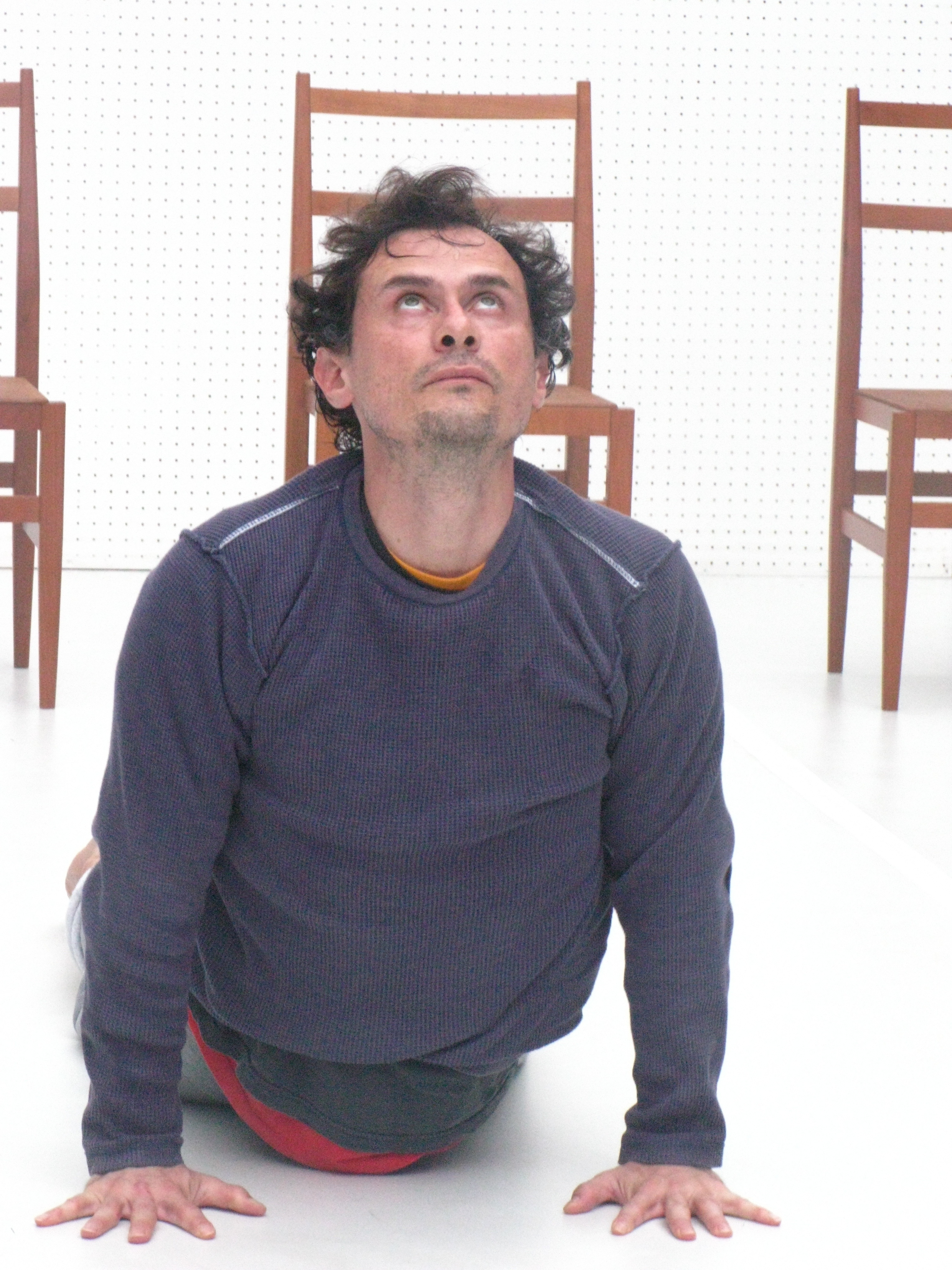 Enrique Diaz, durante o aquecimento para a peça Gaivota, tema para um conto curto de A. Tchekov, apresentada em Shizuoka, Japão durante o festival de Teatro SPAC 2008